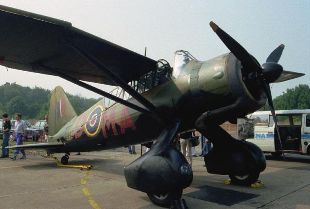 Foto: Westland Lysander